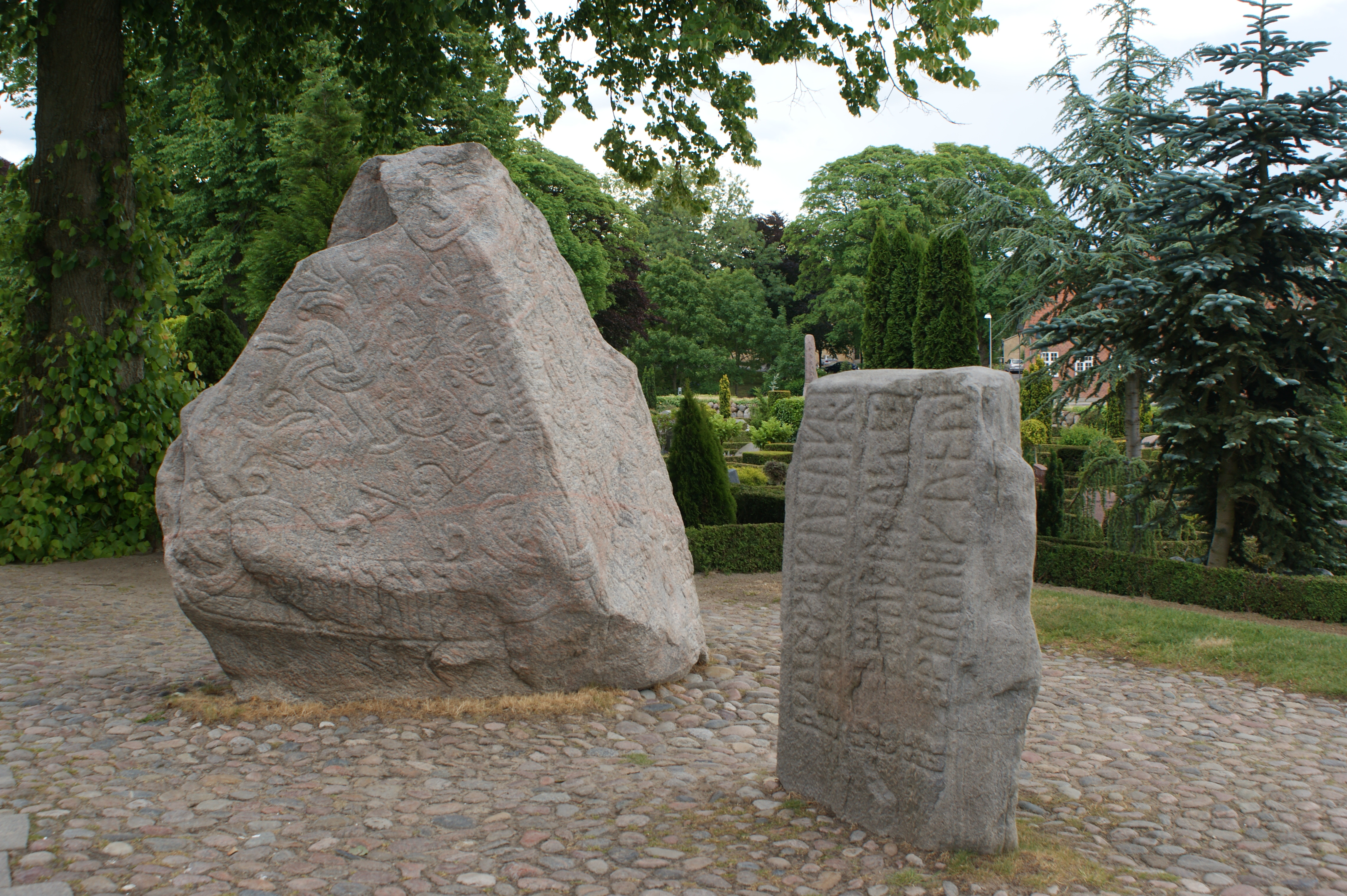 Runenstenen bij grafheuvels en kerk in Jelling(DK).